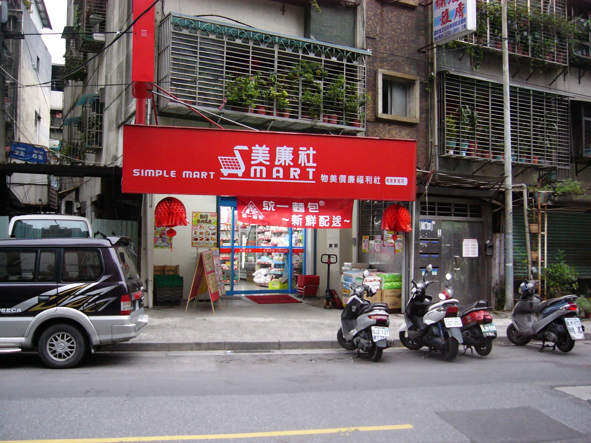 中文（台灣）: 美廉社南港東明店，位於臺北市南港區東明街9號1樓，大門上方吊掛統一麵包廣告布條。